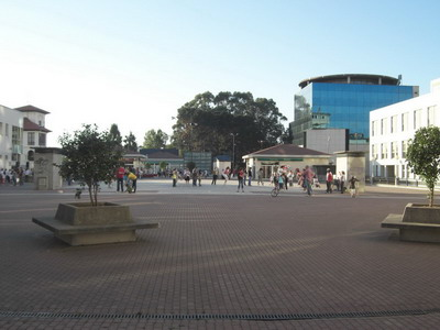 Plaza de Galicia, Narón (A Coruña).